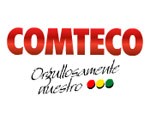 Logo antiguo